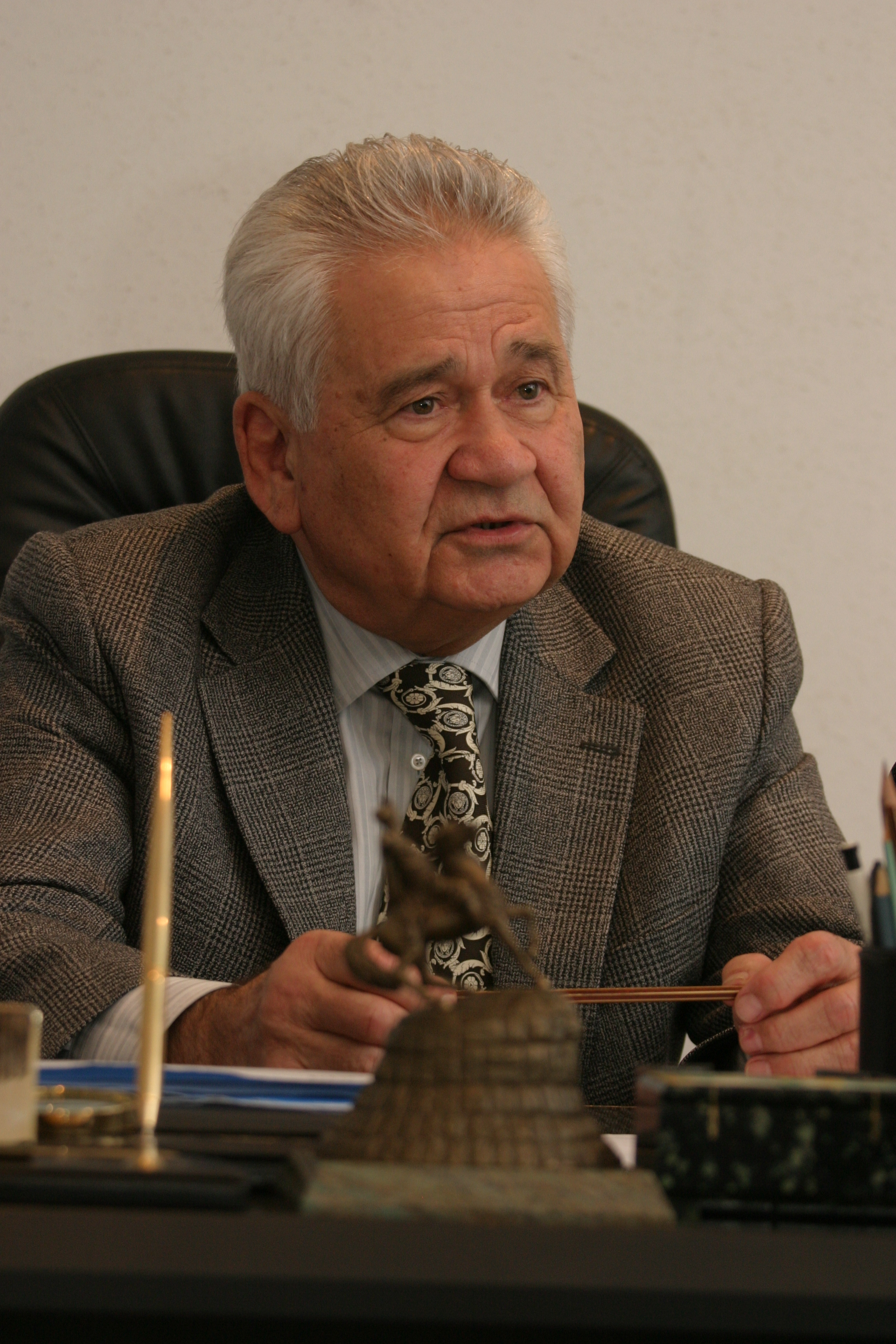 Фокин Витольд Павлович